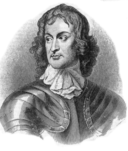 John Lambert (1618 - 1684) Politiker und Soldar